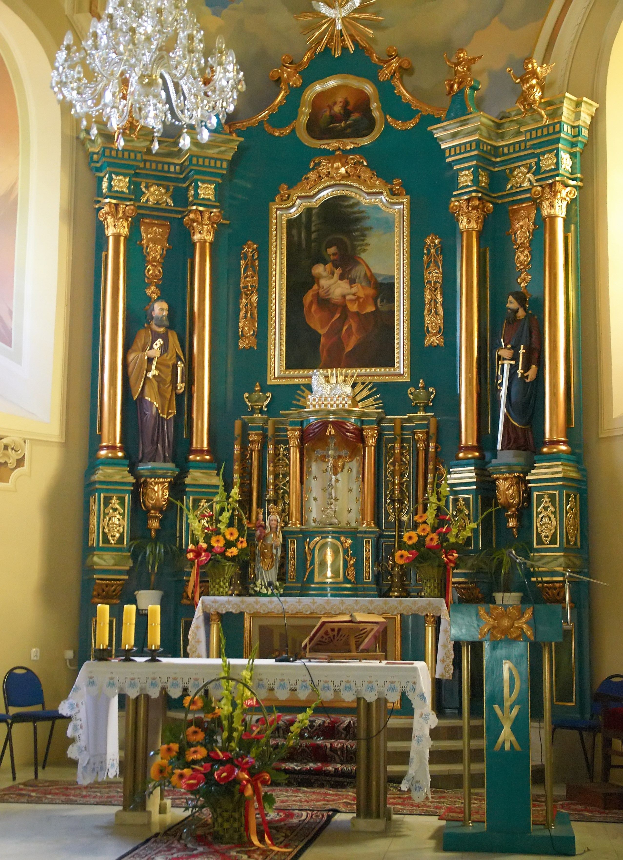 Lipinki, kościół par. p.w. Wniebowzięcia NMP, 1782